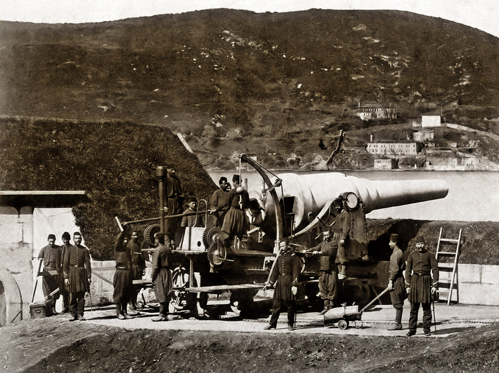 Türkische 28cm Kanone im Abwehrsystem der Festung Medjidi Tabia in der Nähe von Silistra